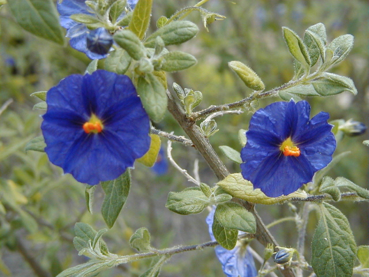 Solanum lycioides. Real Jardín Botánico, Madrid.